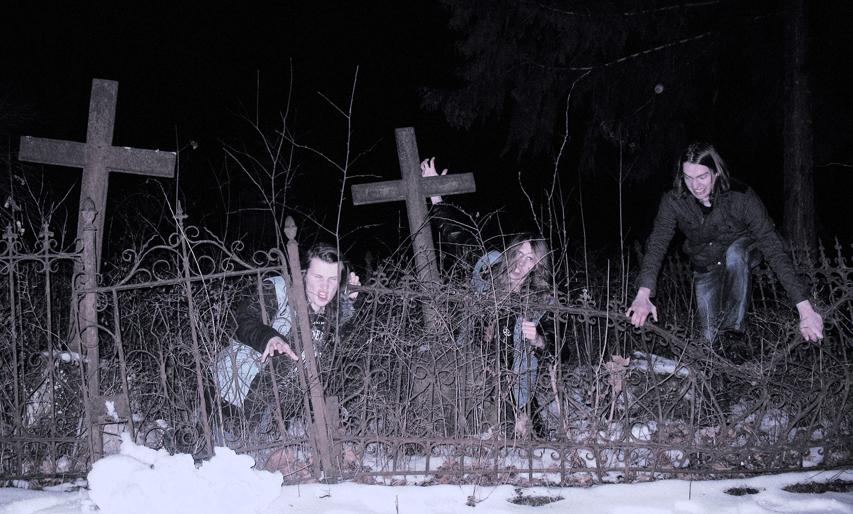 Tankisti algkoosseis aastal 2015 Võru linnakalmistul. Vasakult paremale: Joonas Kisand, Kevin Marks, Rauno Marks.